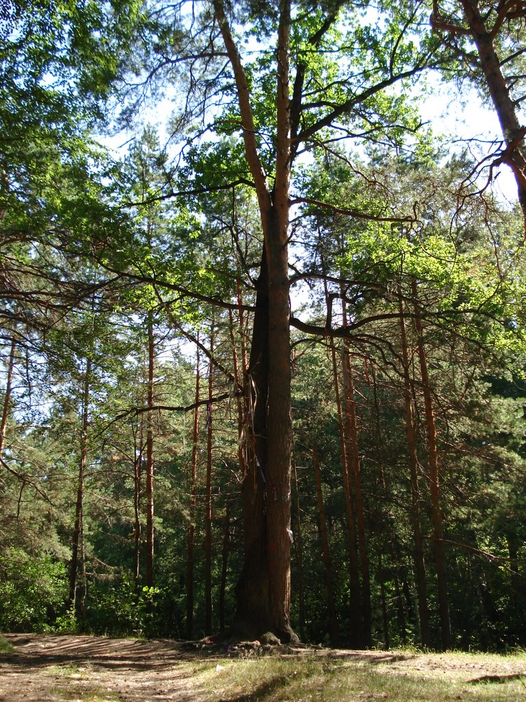 Дерево любви, Тамбовский район This image is related to the protected area of Russia number 6810073